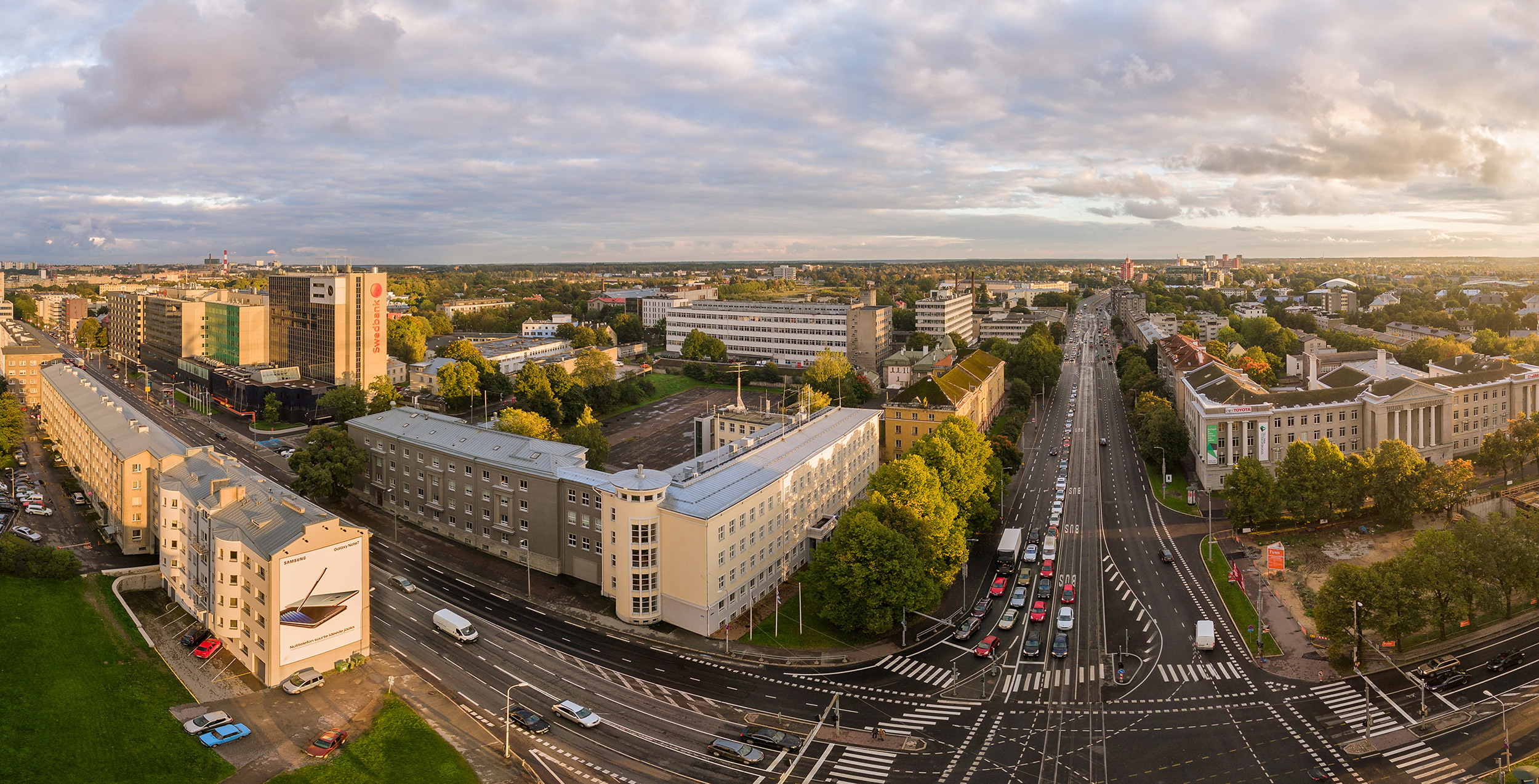 Tallinna Polütehnikum õhust. Vaade koolihoonele Pärnu maantee ja Liivalaia ristilt.